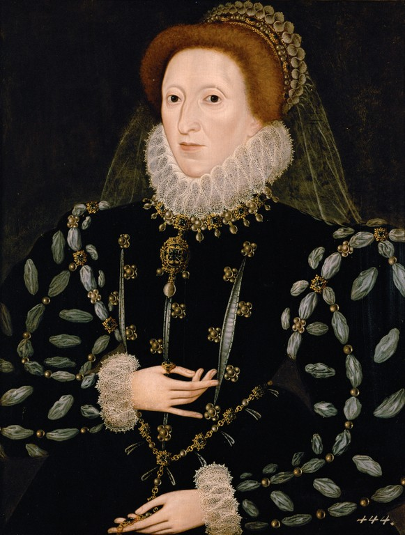 Brustbild